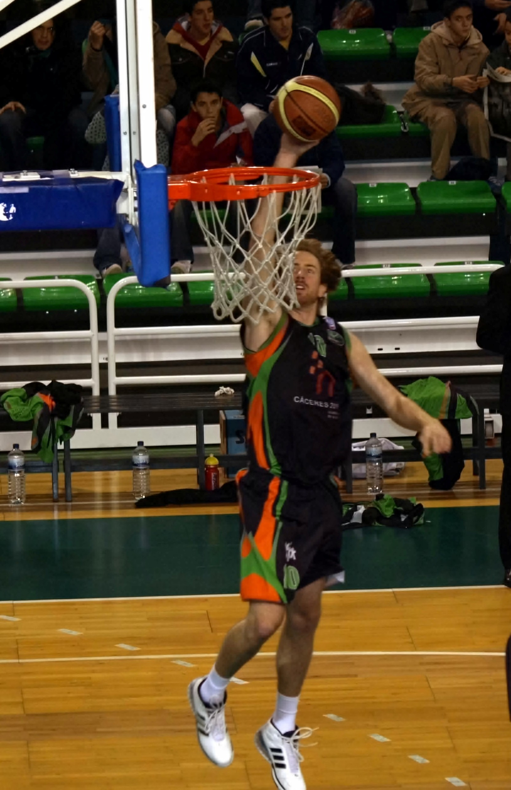 David Patten, jugador del Cáceres 2016 realizando un mate.